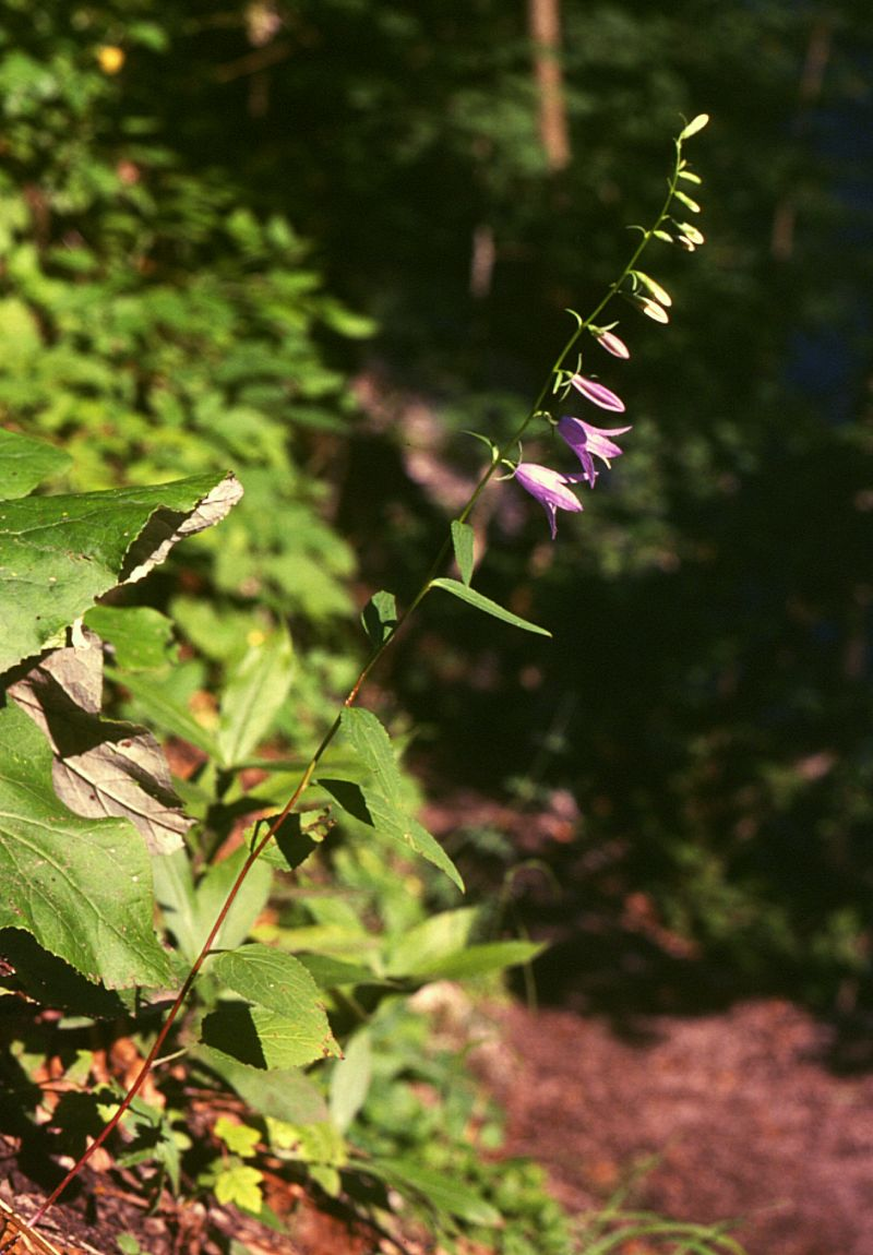 Acker-Glockenblume (Campanula rapunculoides), Glockenblumengewächse (Campanulaceae) - Österreich/Austria/Autriche: Niederösterreich, Erlauftal, Vordere Tormäuer